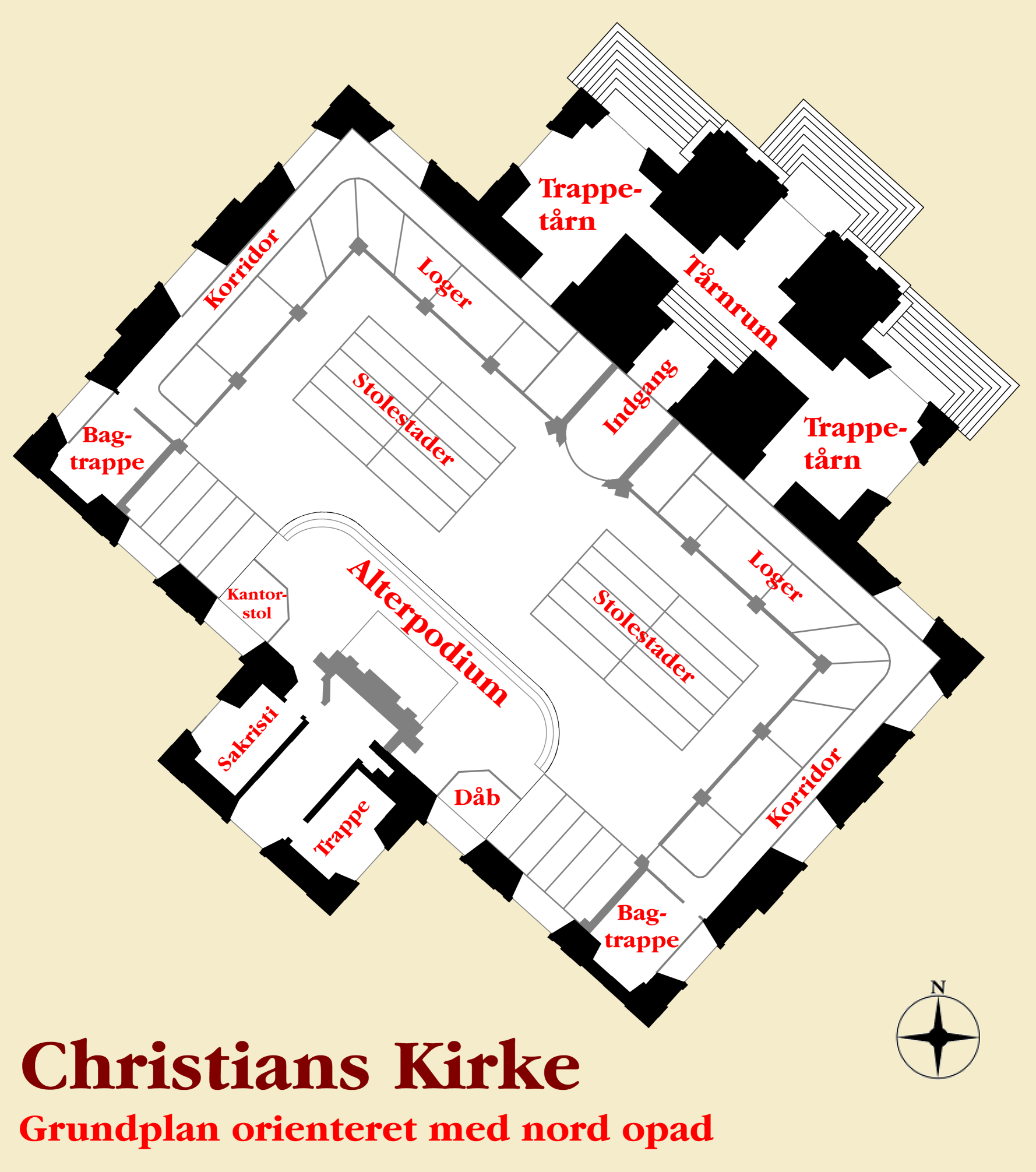 Christians Kirke, Copenhagen, Denmark. Plan drawing